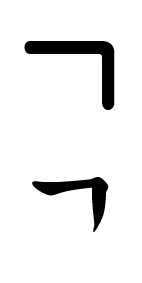 Korean Alphabet ㄱ(gi.yeok)